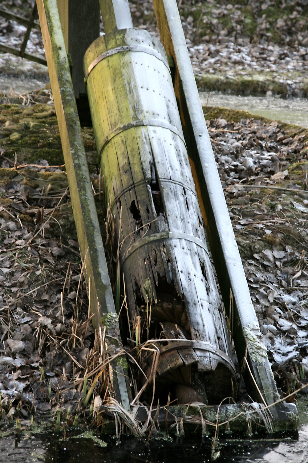 Bolsward: december 2008: Vermolmde vijzel